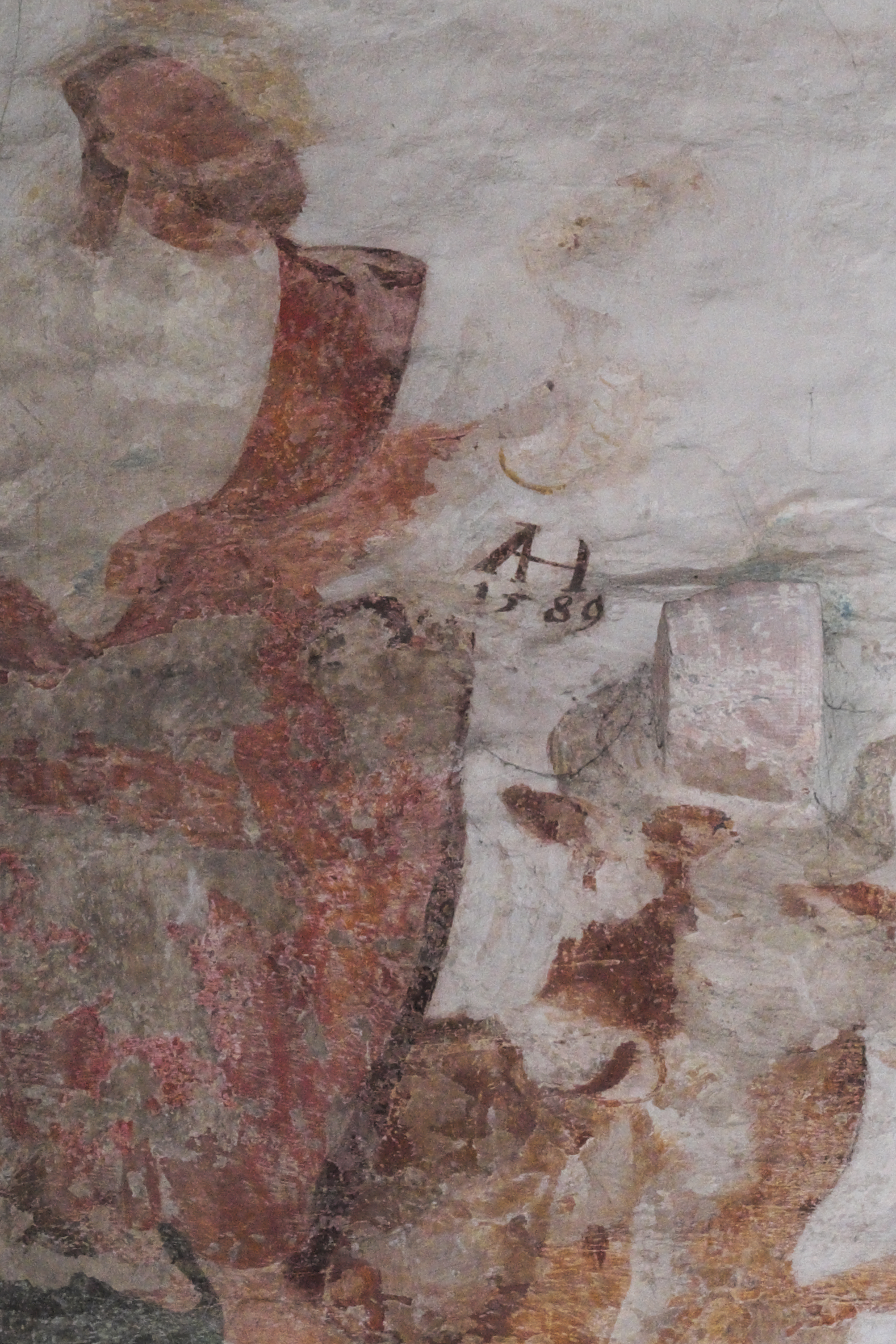 Katholische Martinskapelle in Bürgstadt im Landkreis Miltenberg (Unterfranken/Bayern), Wandmalerei von Andreas Herneisen aus dem Jahr 1589 im Chor, Darstellung: Evangelist Lukas, mit Signatur AH und der Jahreszahl 1589 (Ausschnitt)